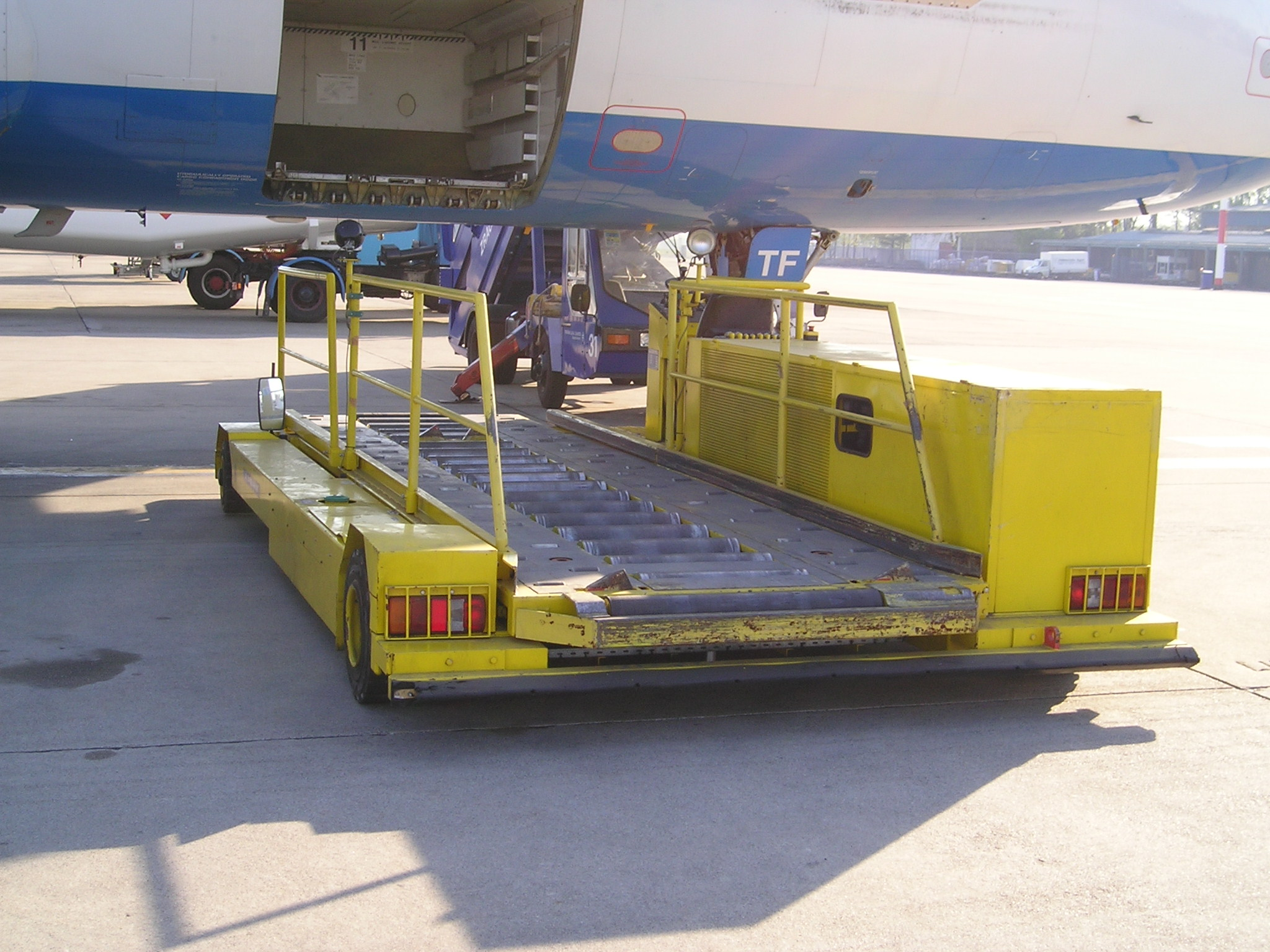 Container transporter